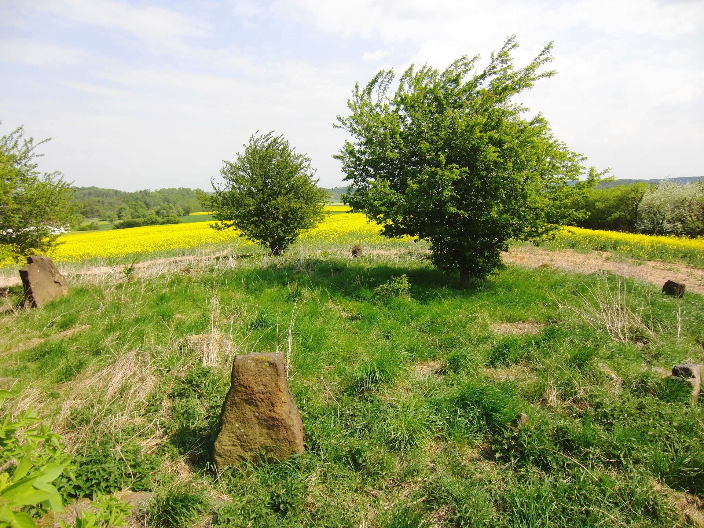 Steinkreis südlich von Börnecke